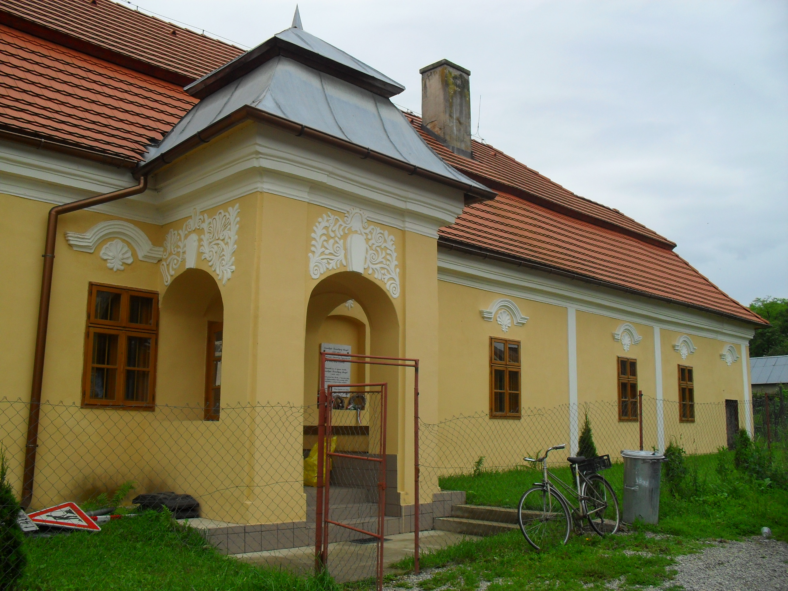 Beretke - kastély/községháza